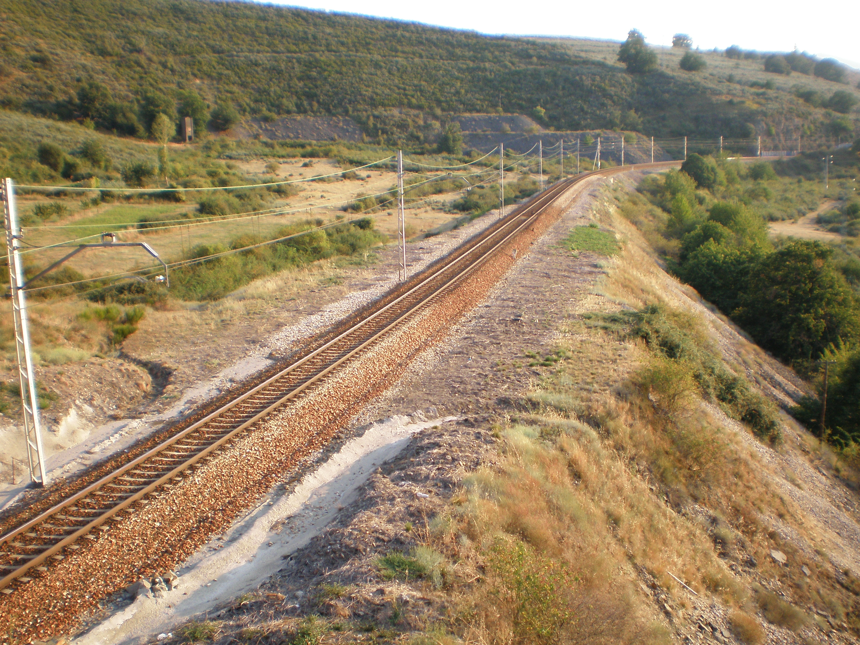 Línea León-La Coruña, entre la estación de La Granja, justo a la salida de esta y mirando hacia ella, y la estación de Brañuelas, en el término municipal de Torre del Bierzo.